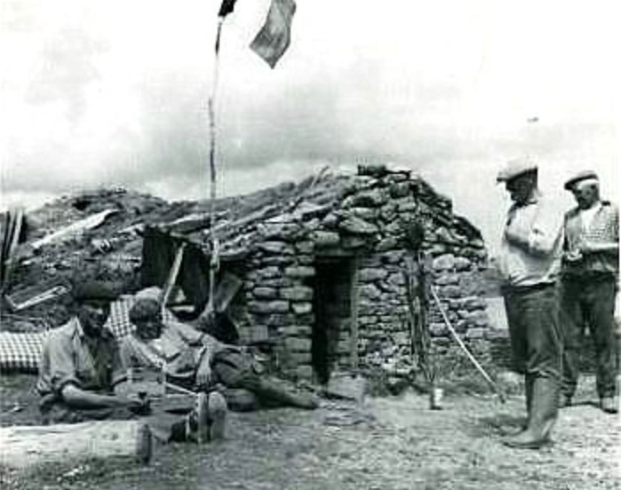 Goémoniers dans l'archipel de Molène (vers le milieu du XXème siècle), auteur inconnu